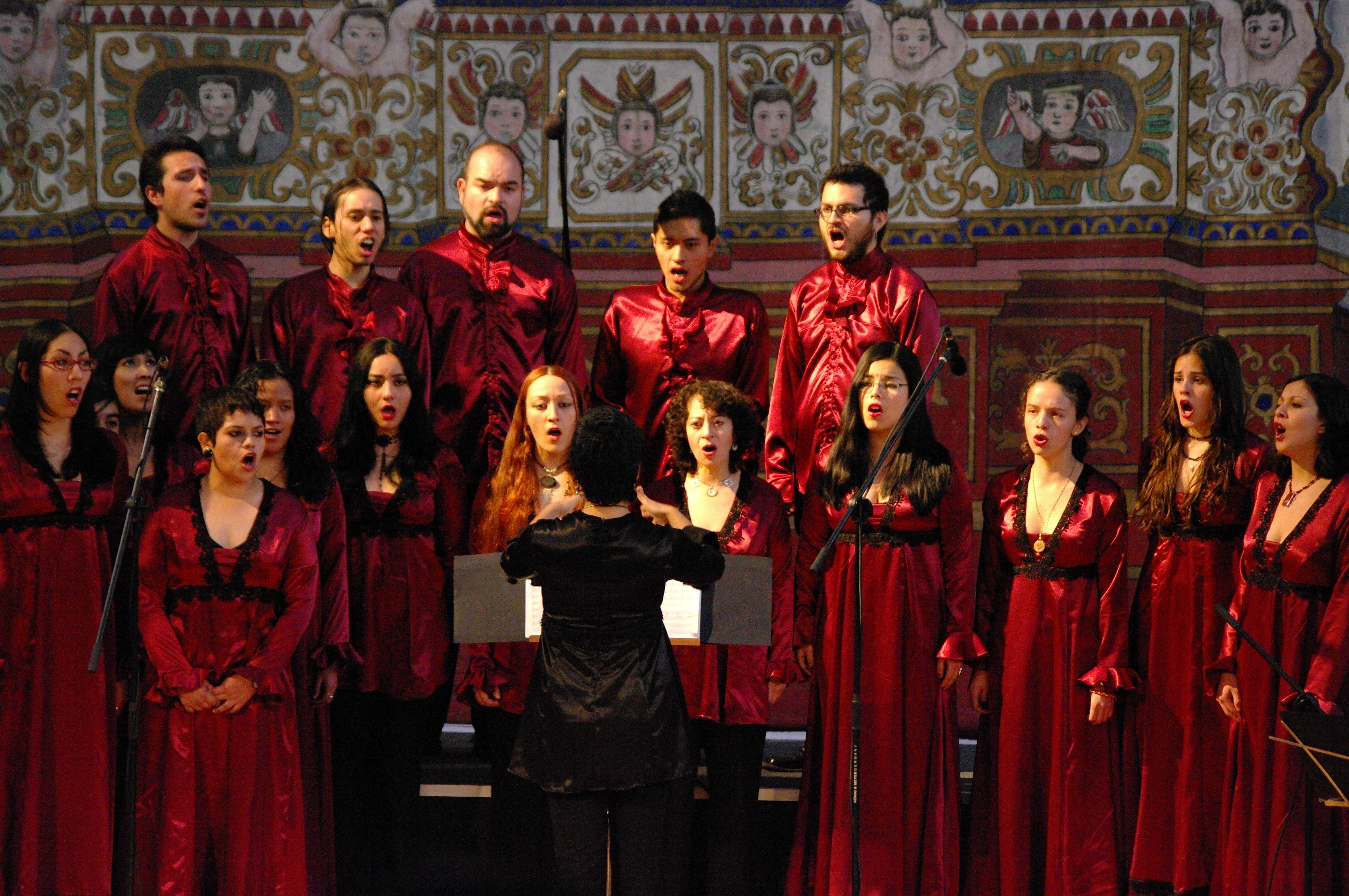 Es una foto que tomé en uno de los conciertos del coro de la universidad, Plaza Loreto, en los conciertos de invierno de 2008. México, DF.